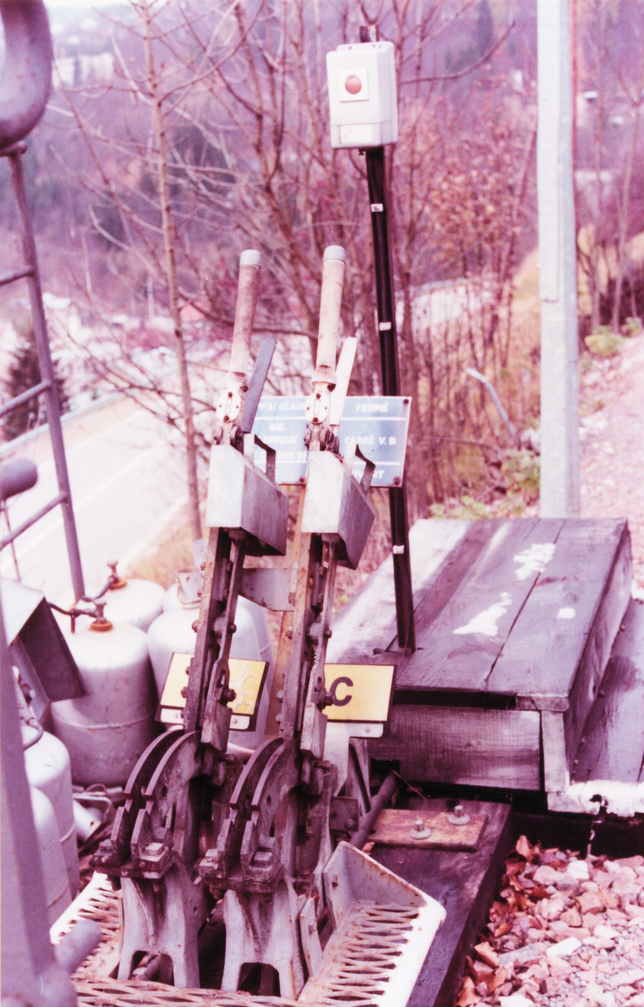 (Railway) France - Ligne à voie unique de Andelot à La Cluse Gare de Morez - Un point de manoeuvre en campagne (Année 1982)